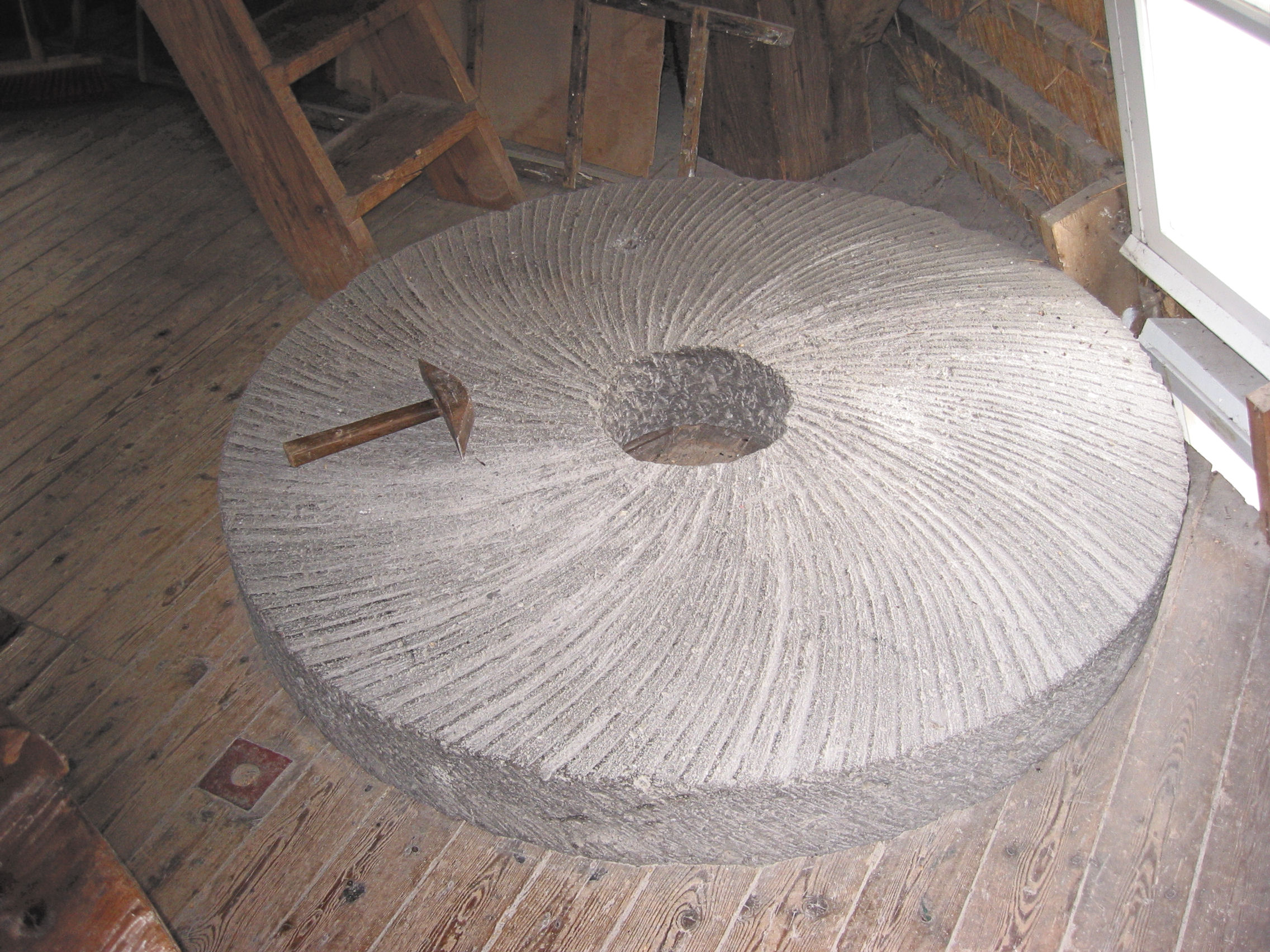 hardstenen molensteen met bilhamer Walderveensemolen in Walderveen, Gelderland, the Netherlands